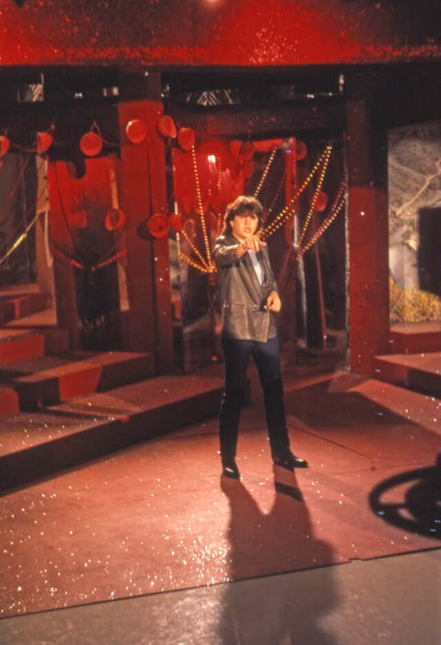 Le chanteur Daniel Balavoine sur le plateau de l'émission Midi Première, le 28 janvier 1980. Il interprète "Le Chanteur".